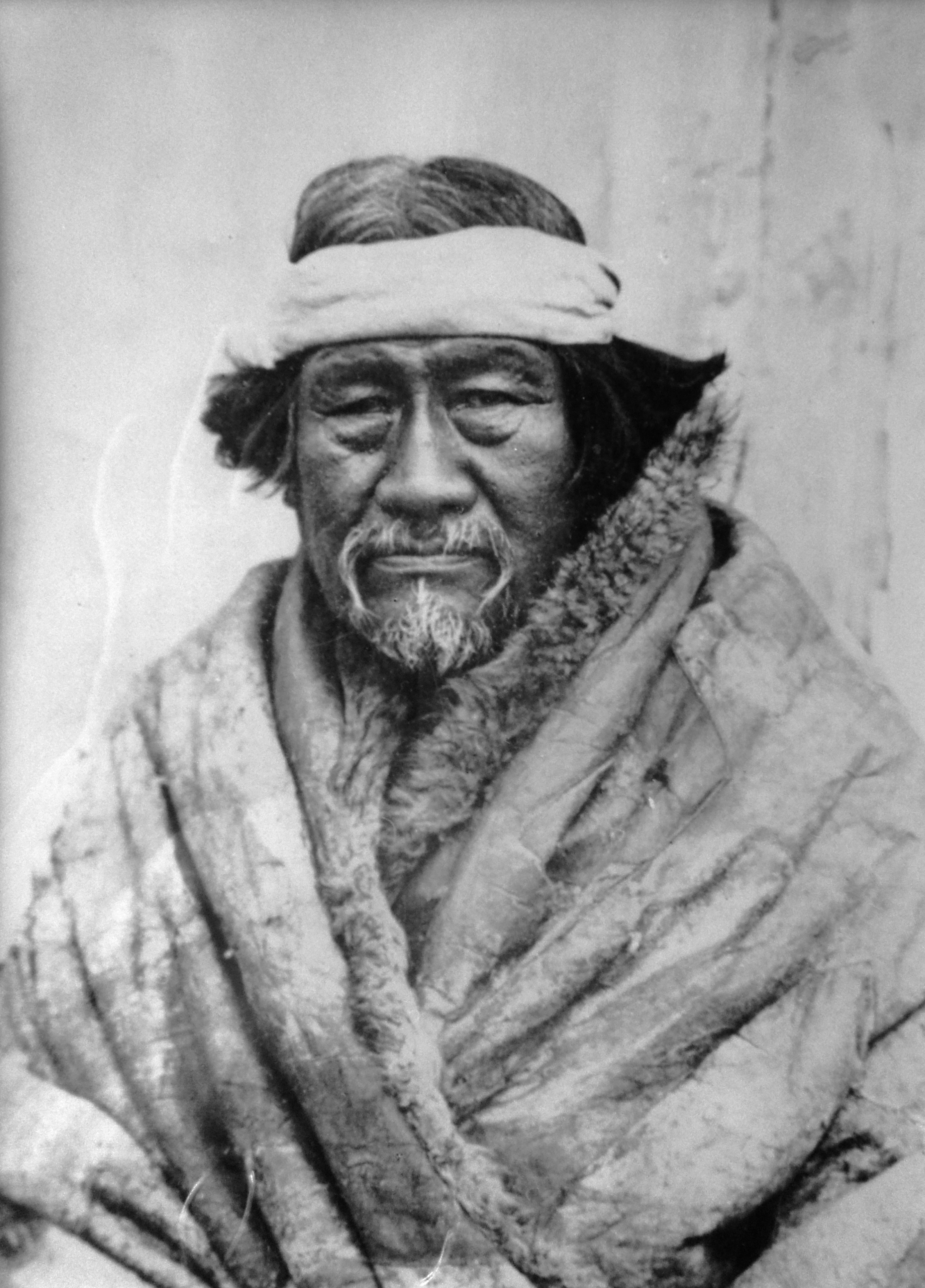 Luis Capece Guaile, alias Capacho, lonco tehuelche nacido en 1845 y fallecido el 12/07/1939.